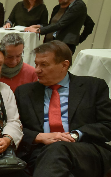 2. Republik. Jubiläum. Resümee. Ausblick